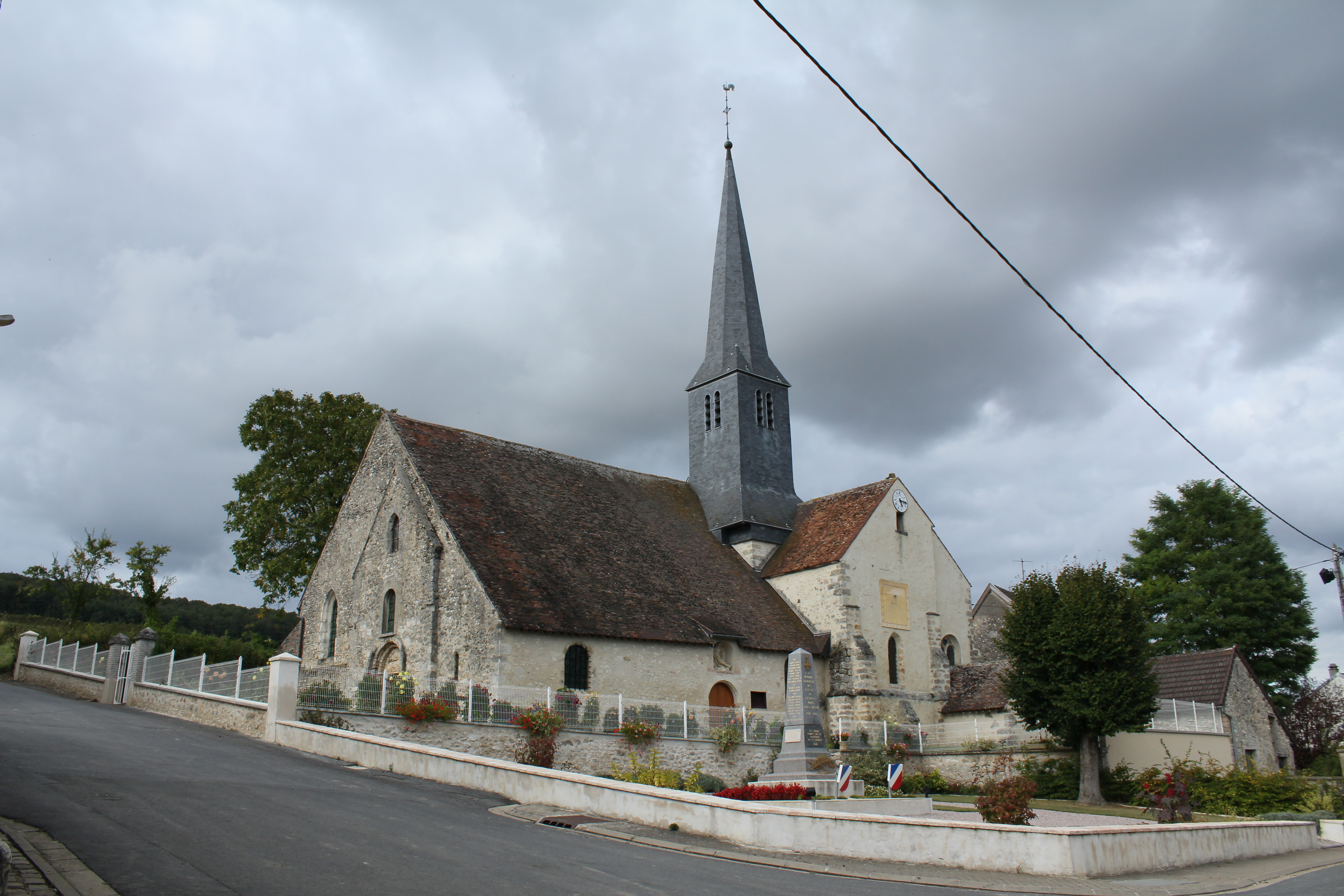 Église Saint-Laurent de Festigny, (Classé, 1921) .